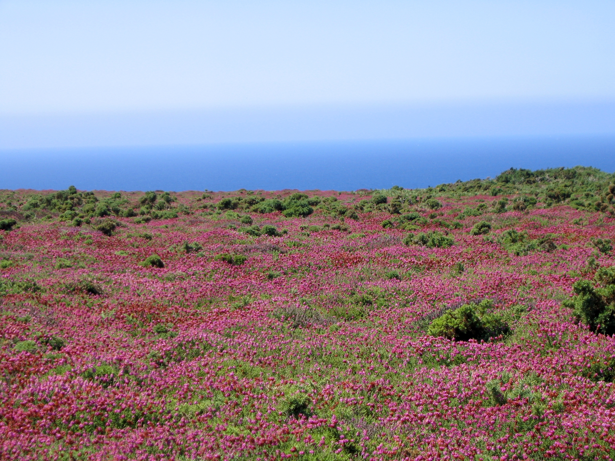 Le cap de la Chèvre à Crozon : bruyère en fleurs